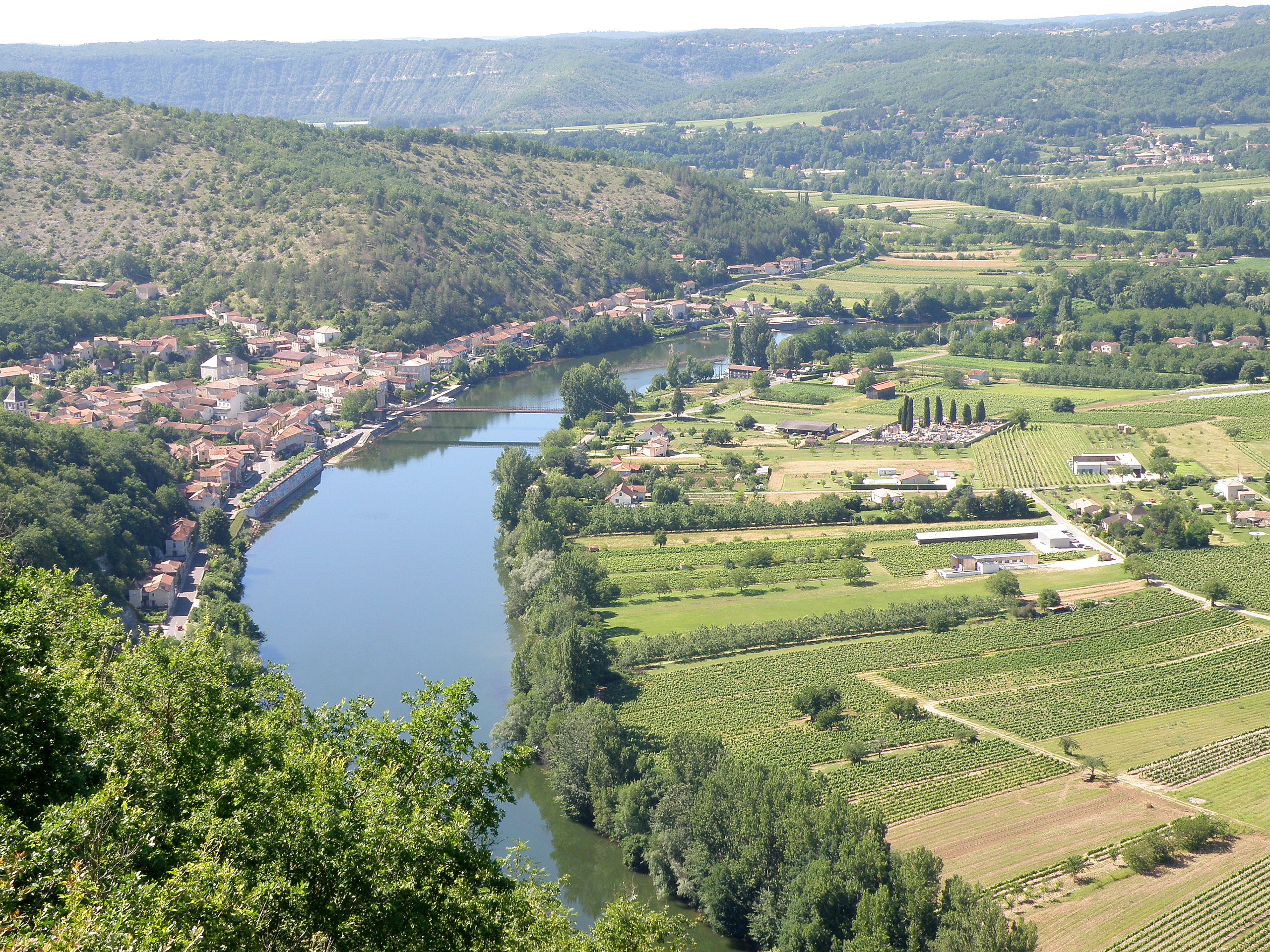 Douelle, commune du département du Lot, France (région Midi-Pyrénées). Vue générale du bourg, situé sur la rive gauche du Lot. Vue prise depuis la cévenne de Douelle, au sud-est du bourg. La plaine à droite, déterminée par une boucle du Lot, appartient également à la commune.